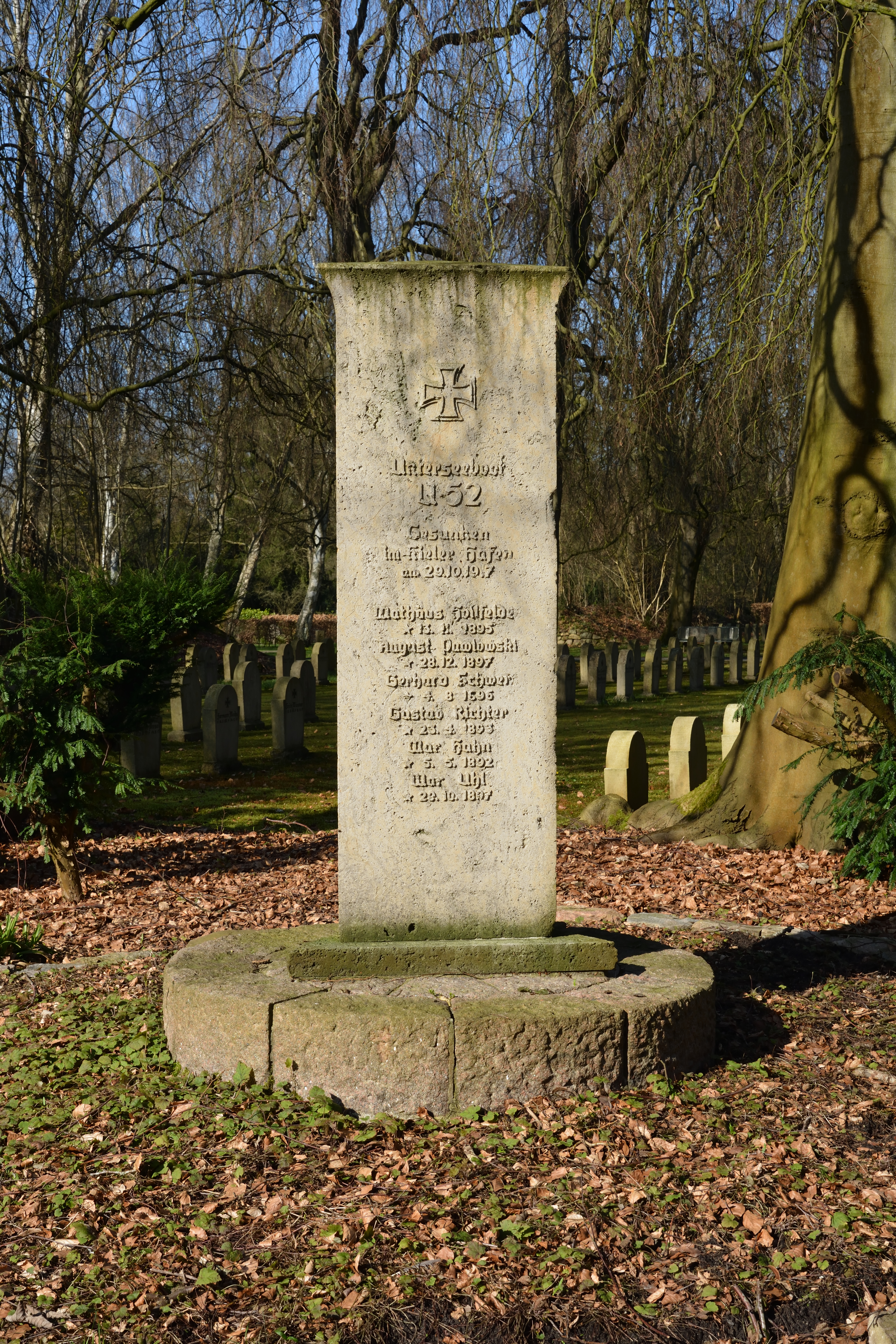 Impressionen aus dem Nordfriedhof in Kiel Ein Grossteil diese Friehofes ist den Gefallenen der beiden Weltkrige gewidmet. Stele der Gemeinschaftsgrabstätte der Besatzungsmitglieder von dem Unterseeboot U 52